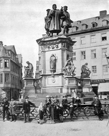 Gutenbergdenkmal Frankfurt am Main, Rossmarkt, vor 1892